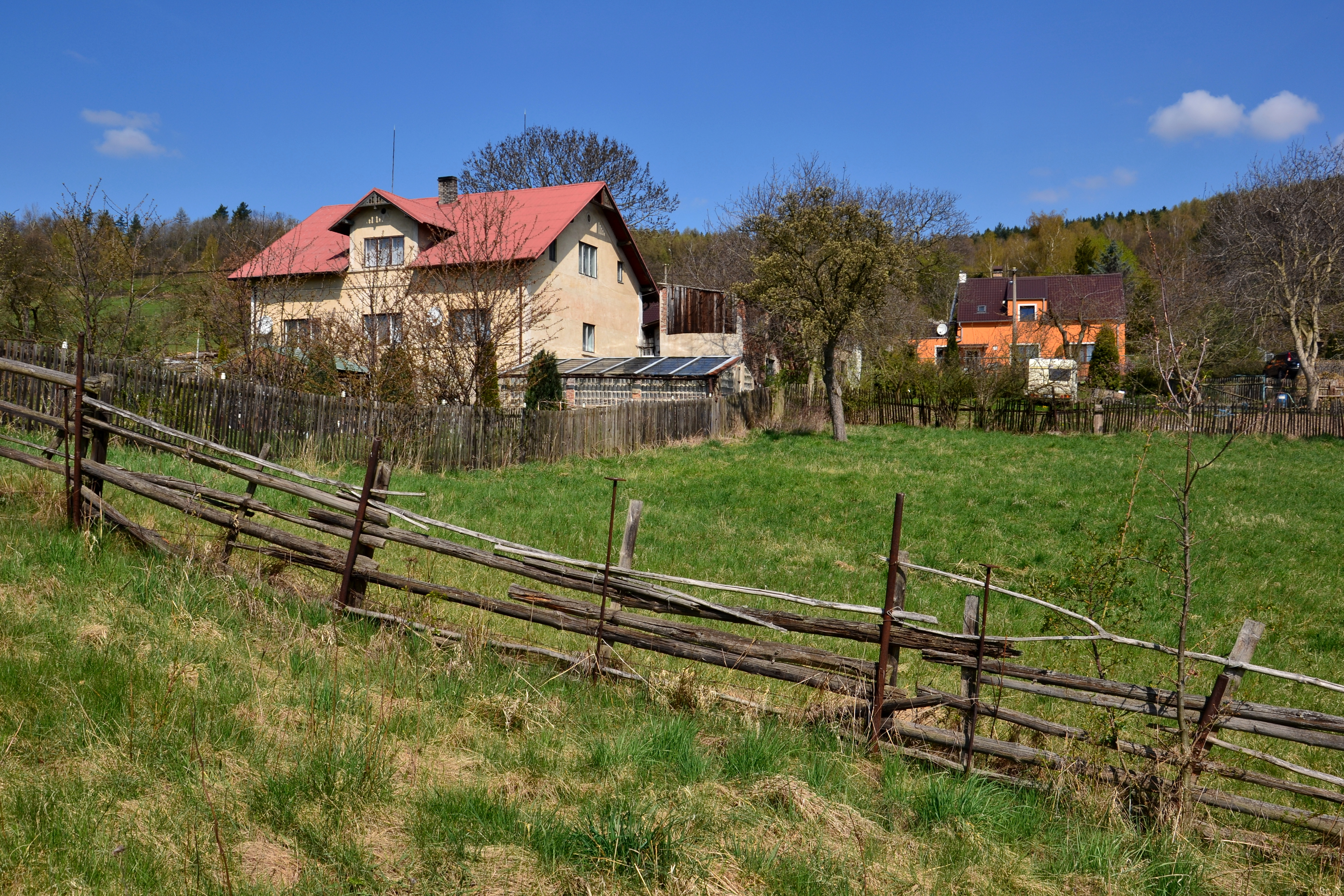 Domy ve východní části vesnice